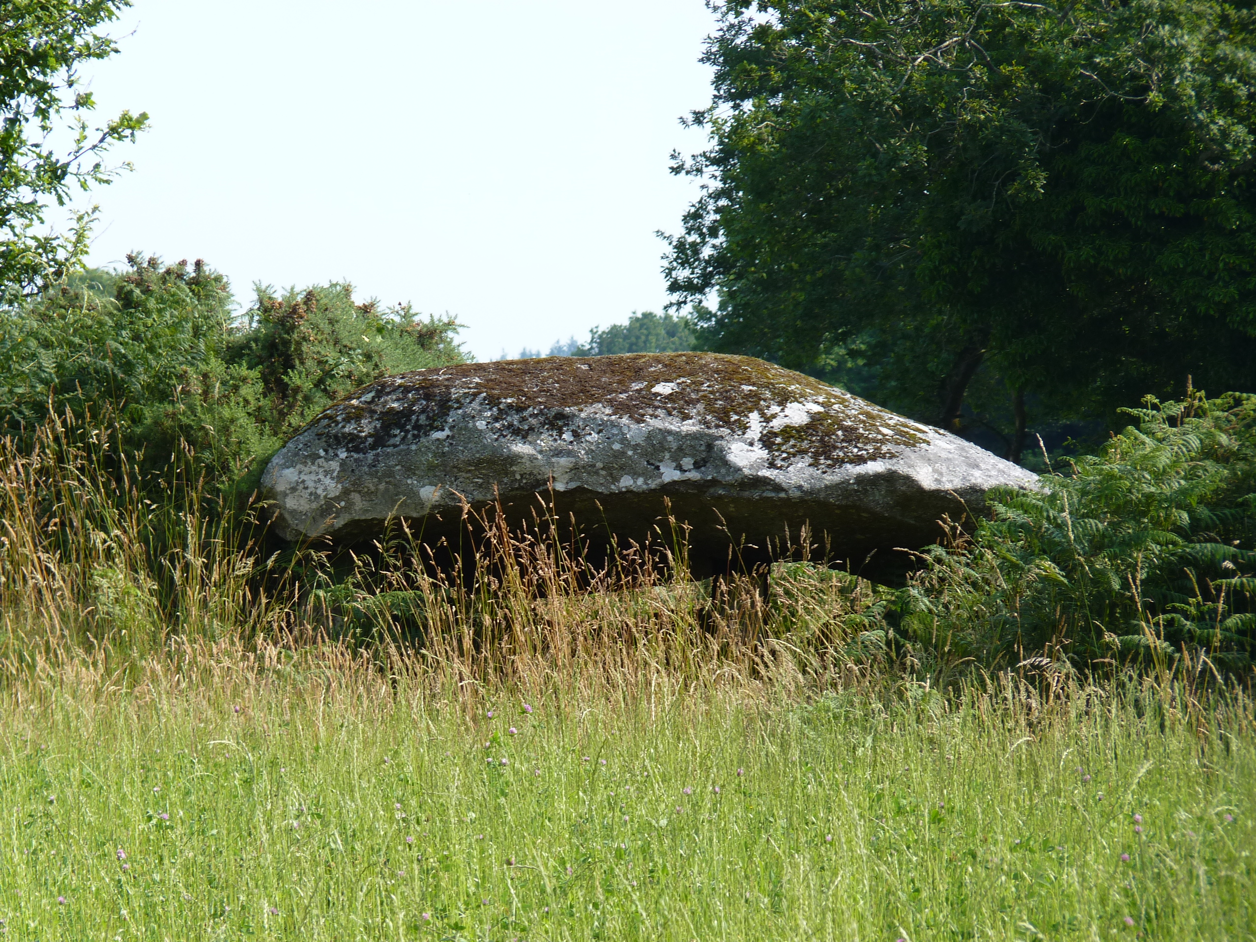 Dolmen dans les herbes hautes.